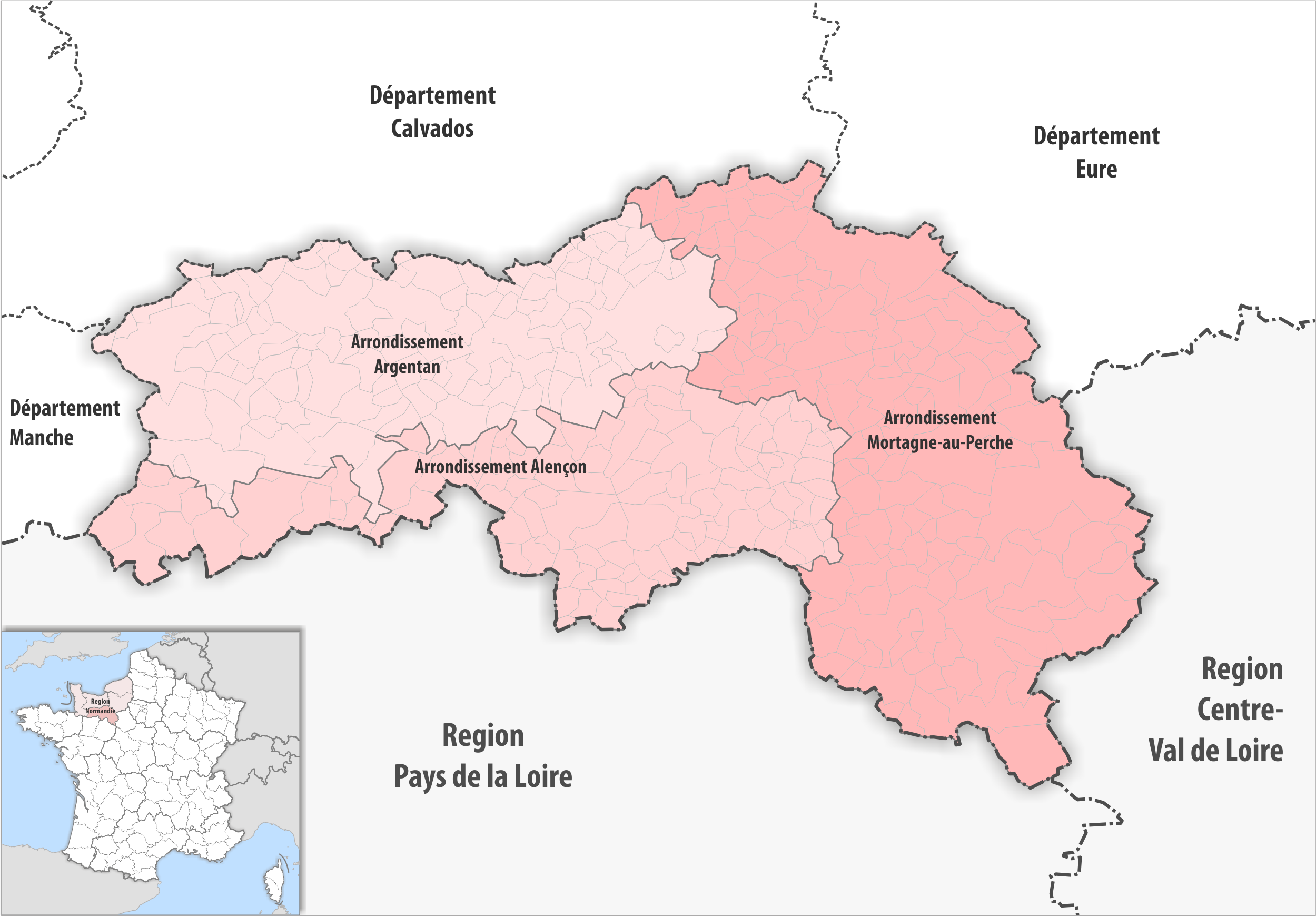 Gemeinden und Arrondissemente im Departement Orne